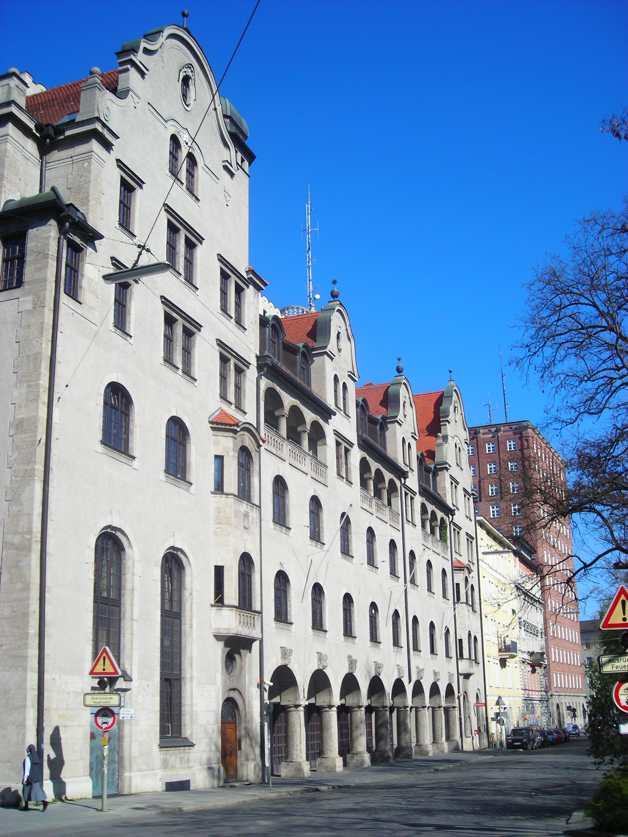 Dienstgebäude des Kreisverwaltungsreferates München, Branddirektion München sowie der Feuerwache 1, An der Hauptfeuerwache 8, D-80331 München (Blickrichtung Osten). Das Gebäude wurde von der Berufsfeuerwehr München am 11. Juli 1904 bezogen [1]